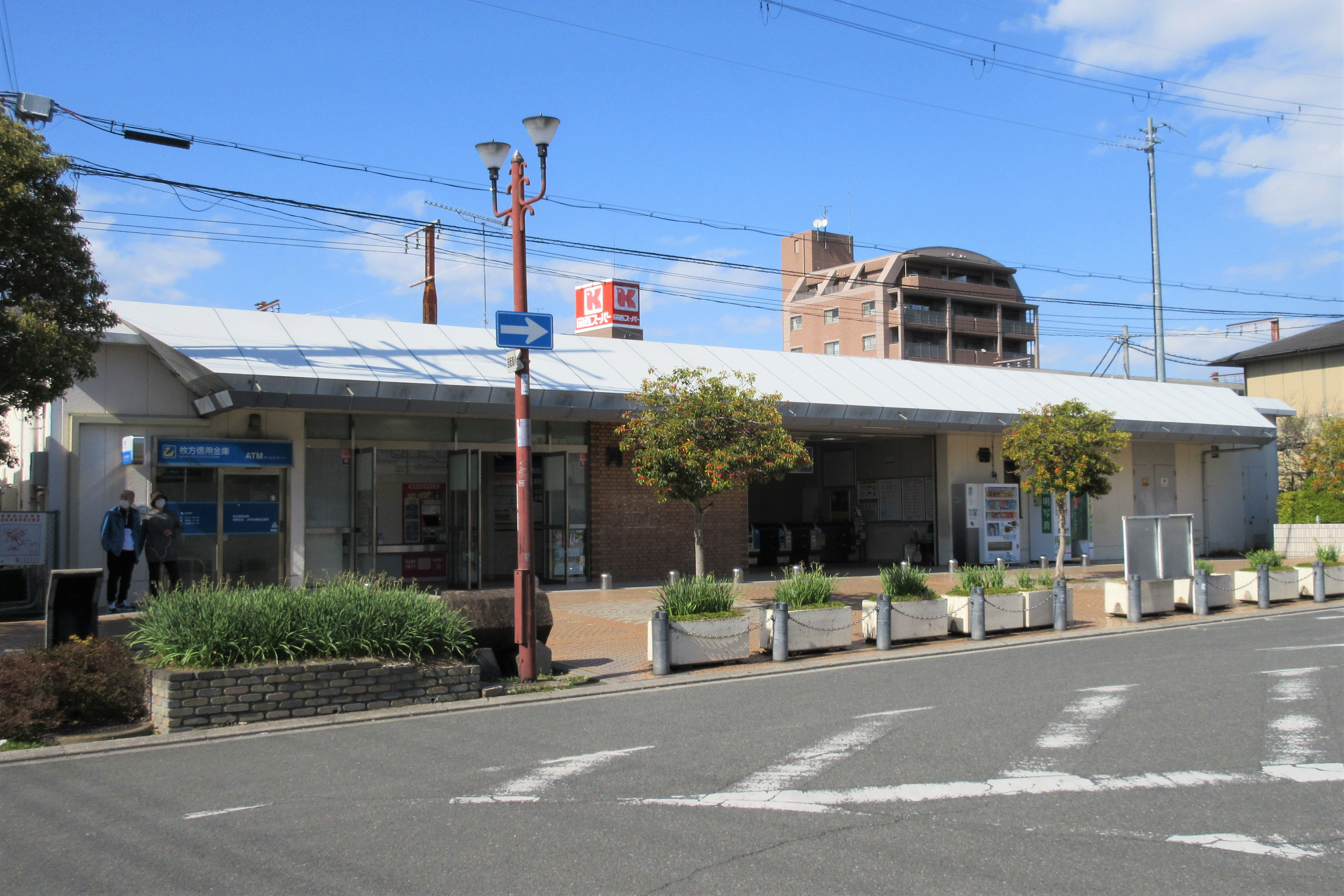 JR河内磐船駅